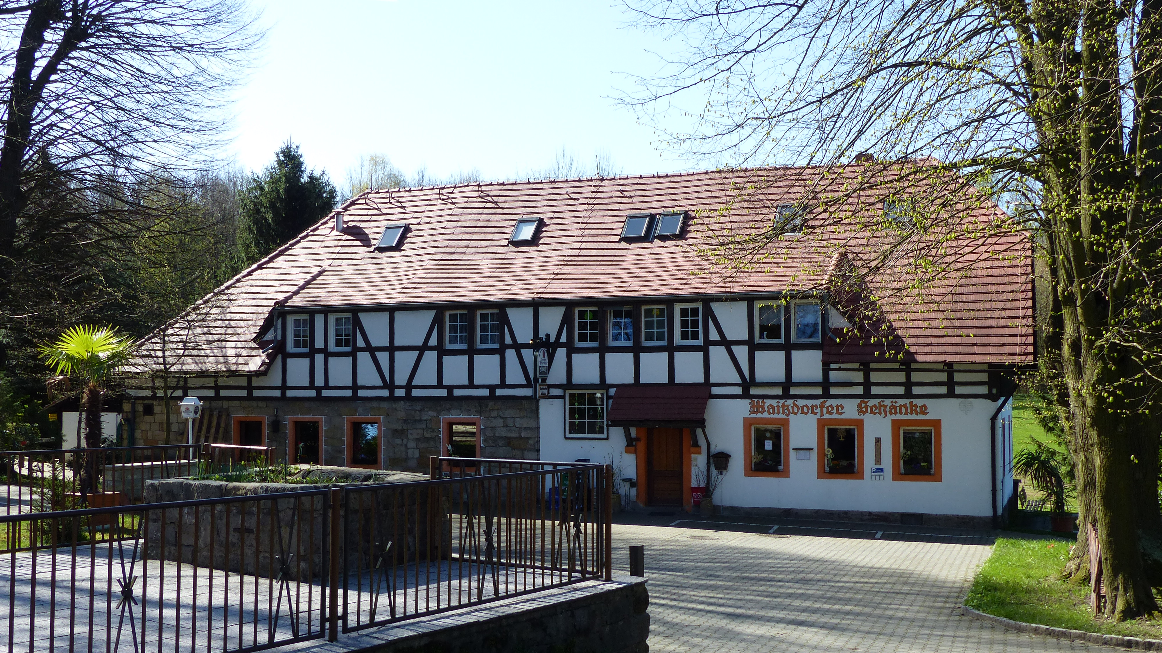 Waitzdorfer Schänke, Denkmalgeschütztes Umgebindehaus, Zum Dorfgrund 1, Waitzdorf (Hohnstein)